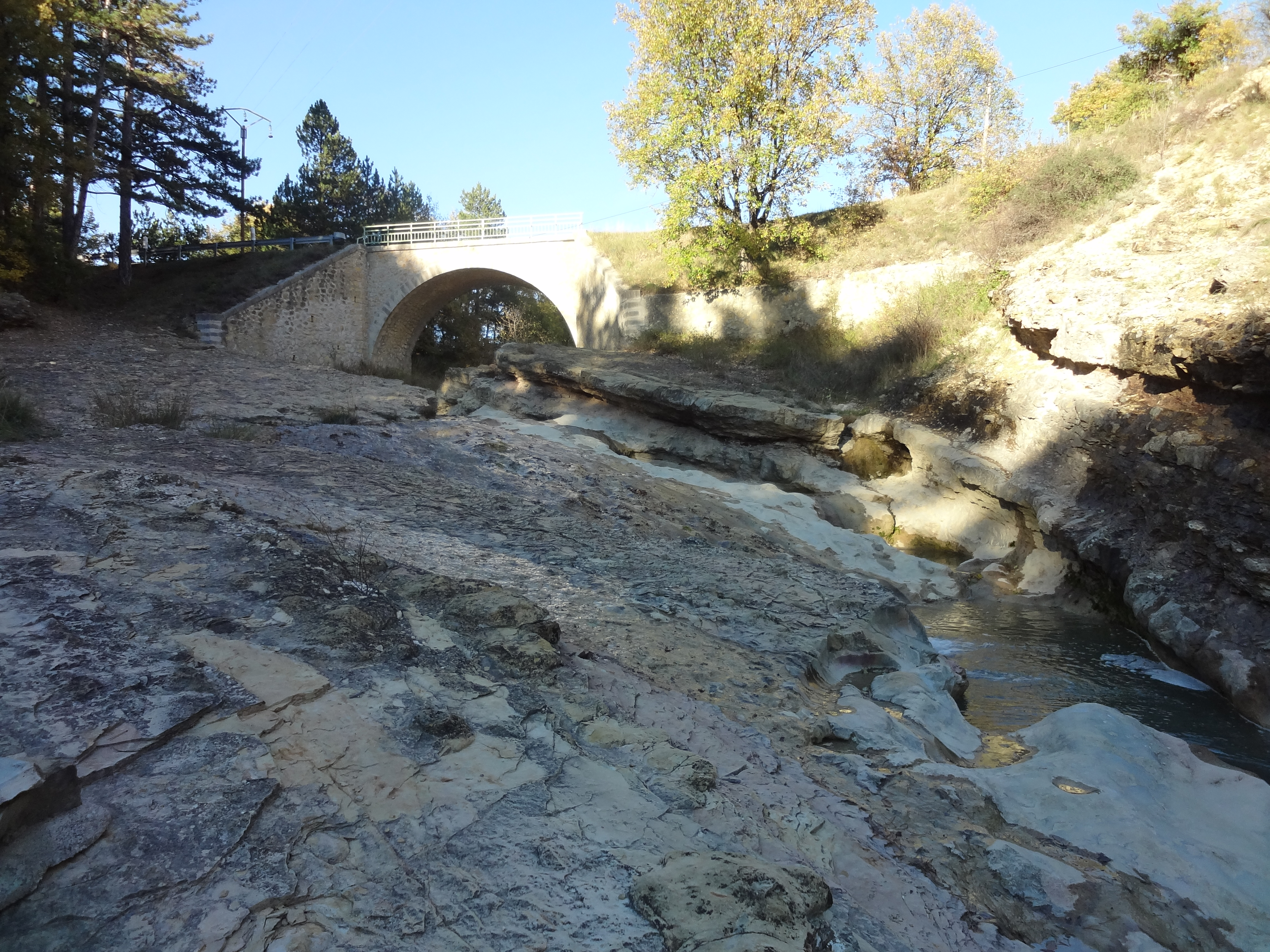 Pont de la RD 16 sur le Lauzon à Montlaux (altitude 538 m).